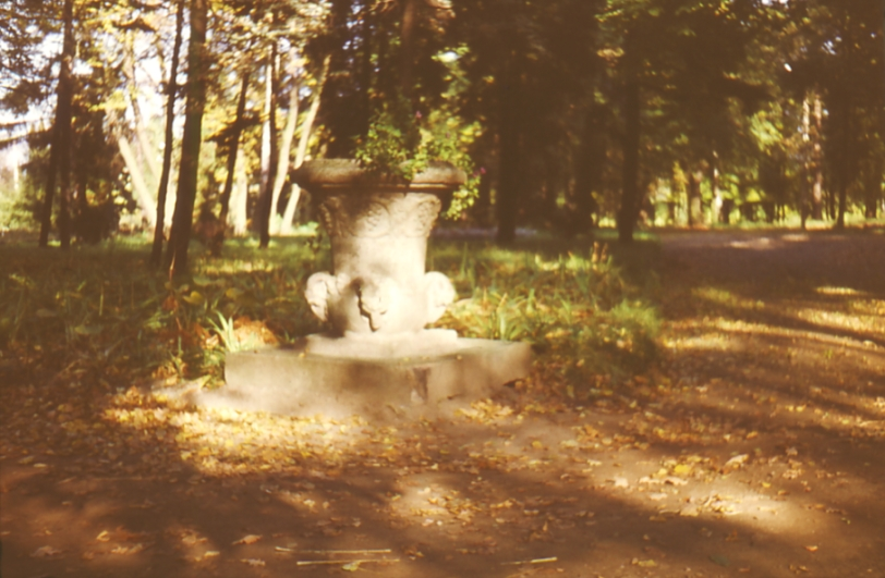 Aleksandrów Kujawski, Park